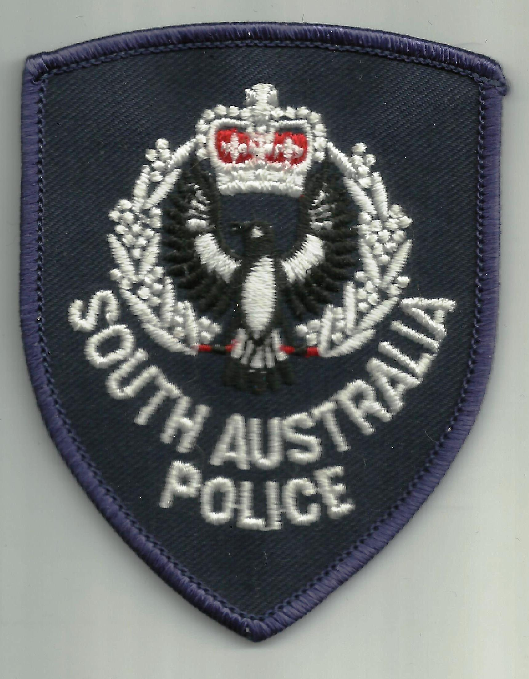 South Australia politie embleem